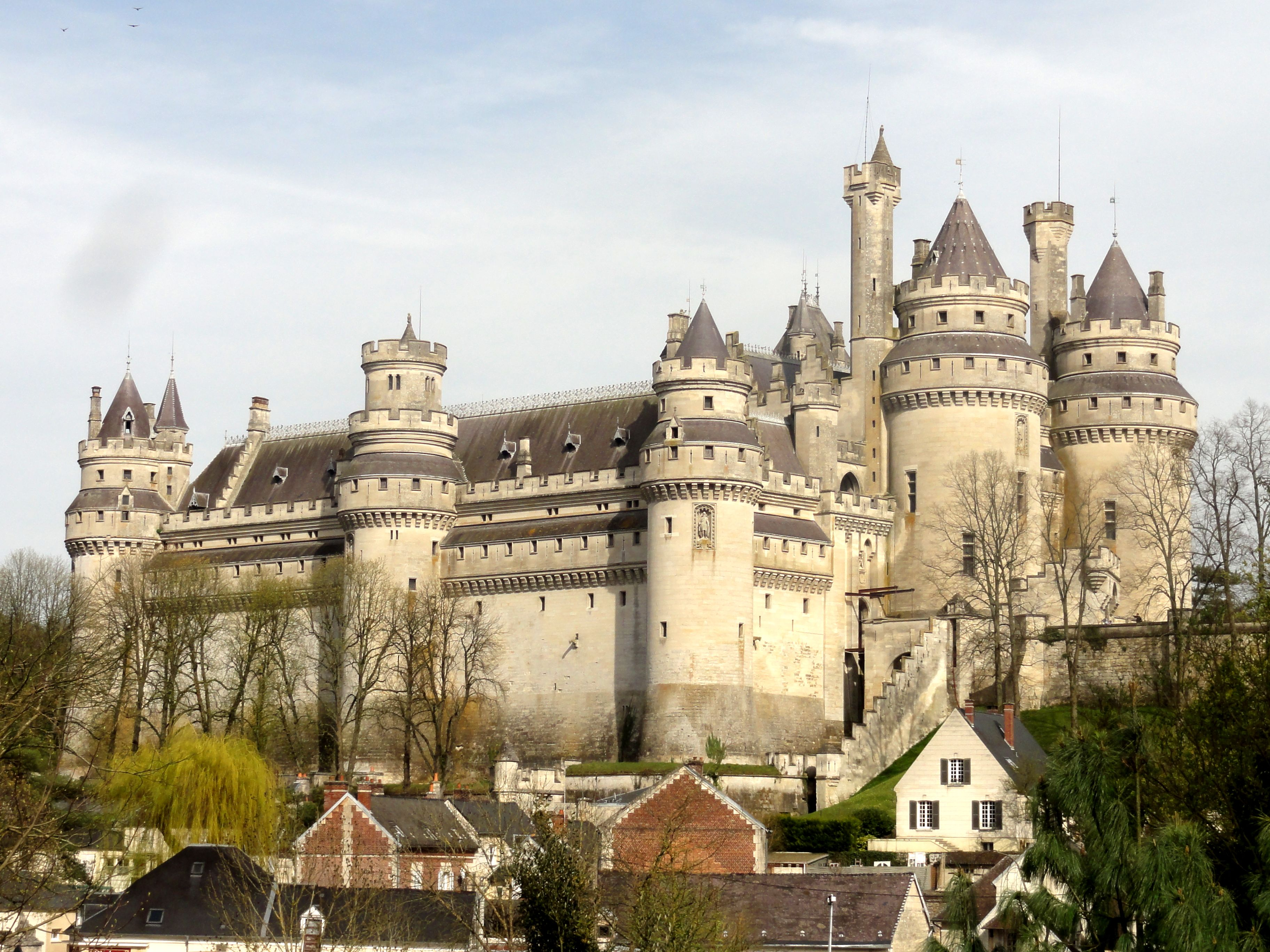 Vue depuis le sud-ouest.